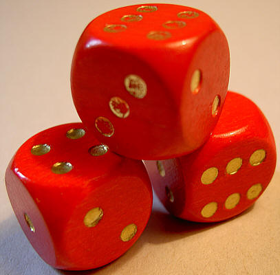 Drei rote Würfel